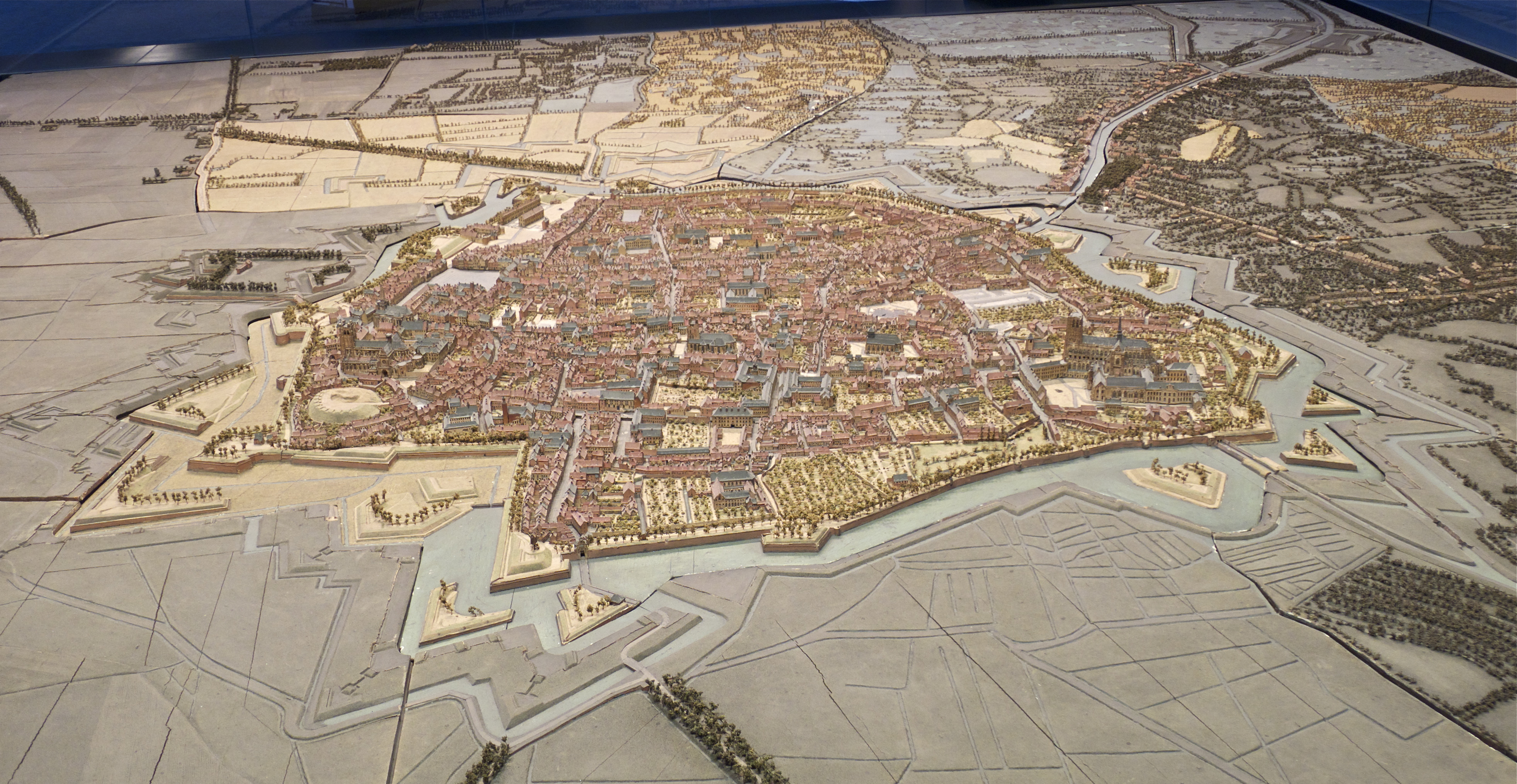 Plan-relief de Saint-Omer, vue du sud. Plan-relief construit en 1758 sous la direction de Jean-Baptiste Larcher d'Aubencourt (1711-1793). Échelle 1/600e